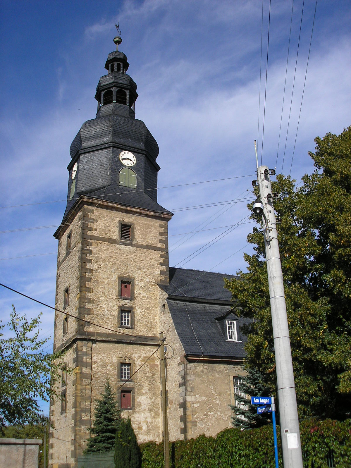 Die St.-Peter-und Paul-Kirche von Elxleben (Ilm-Kreis, Thüringen, Deutschland)